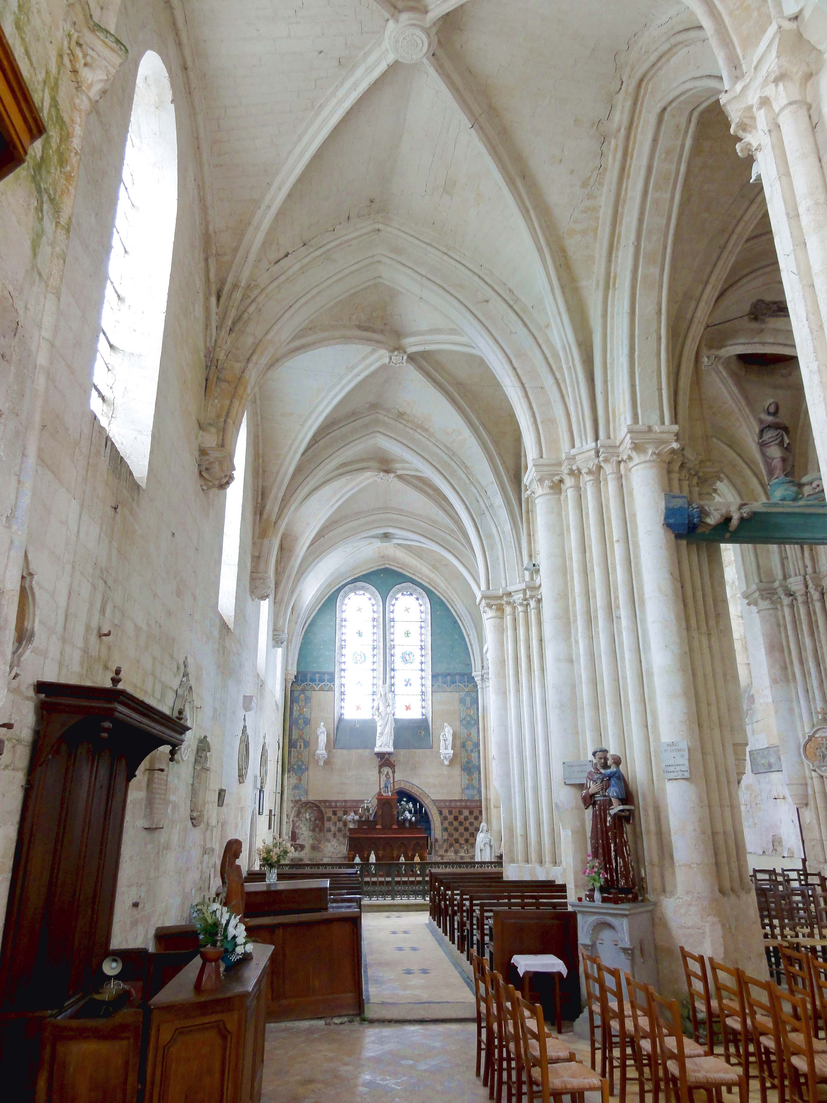 Intérieur de l'église - voir titre.